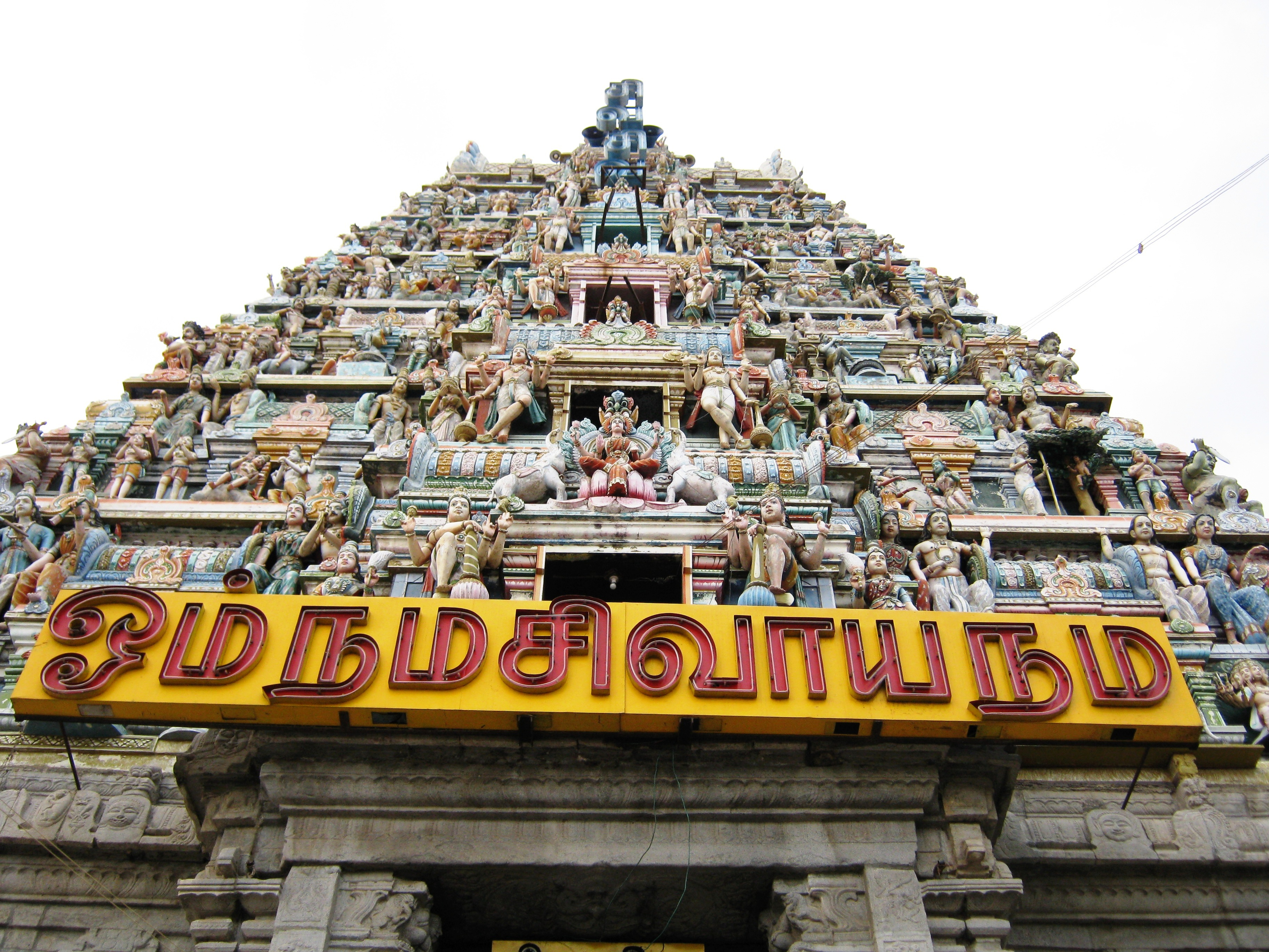 SRI THAAN THONTRIESWARER TEMPLE, Belur, Salem